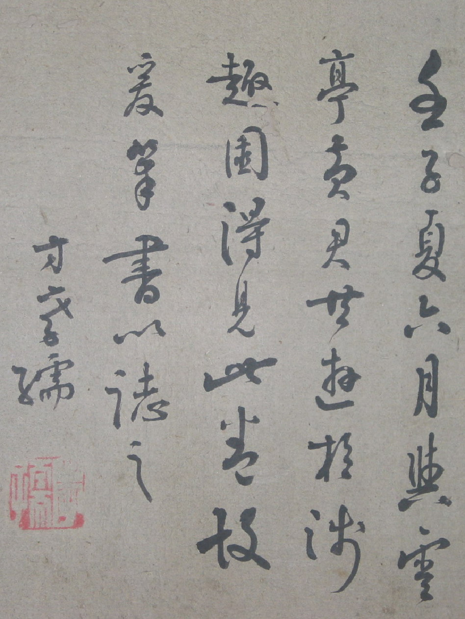 《蓬戶手卷》前代名人題跋.